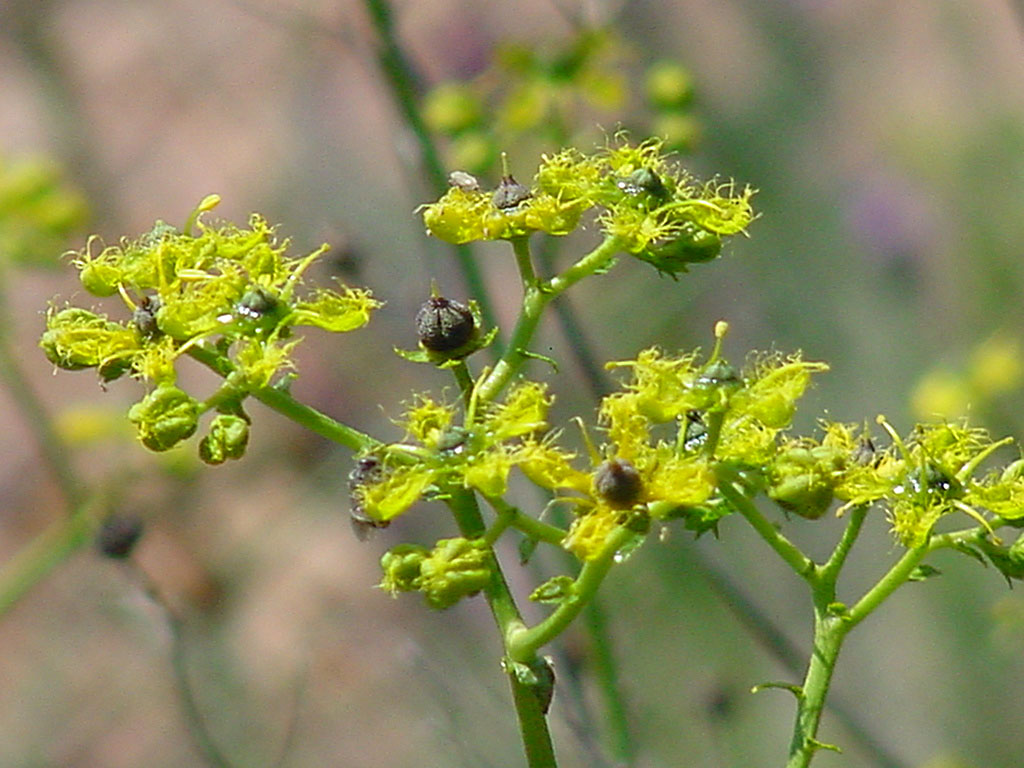 Rue de Chalep (Ruta chalepensis)